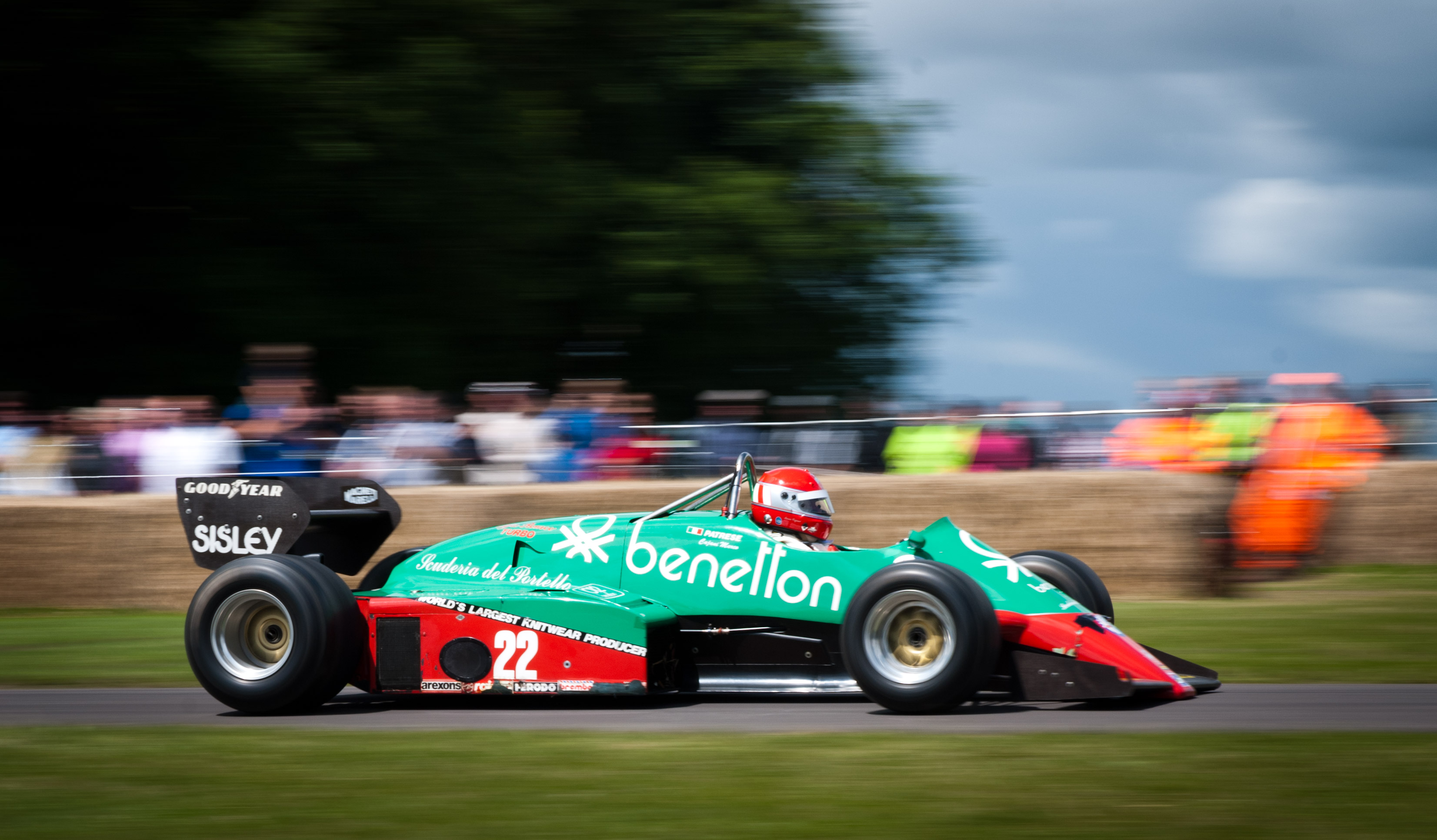 Alfa-Romeo 183T "Riccardo Patrese"